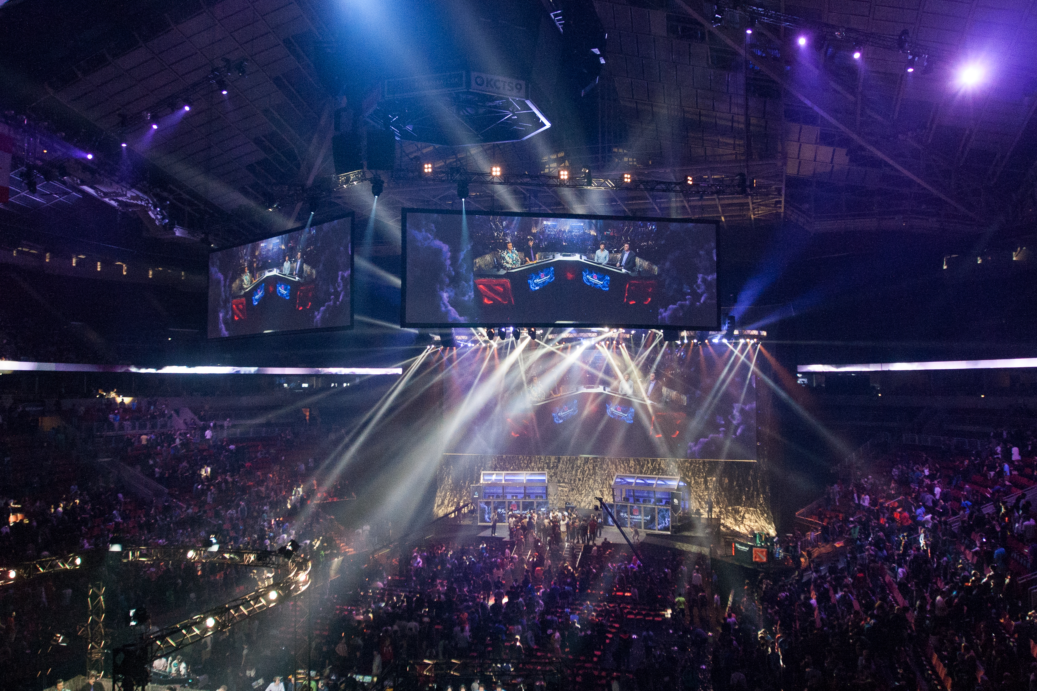 Die Preisverleihung nach dem Grand Final des The International 4